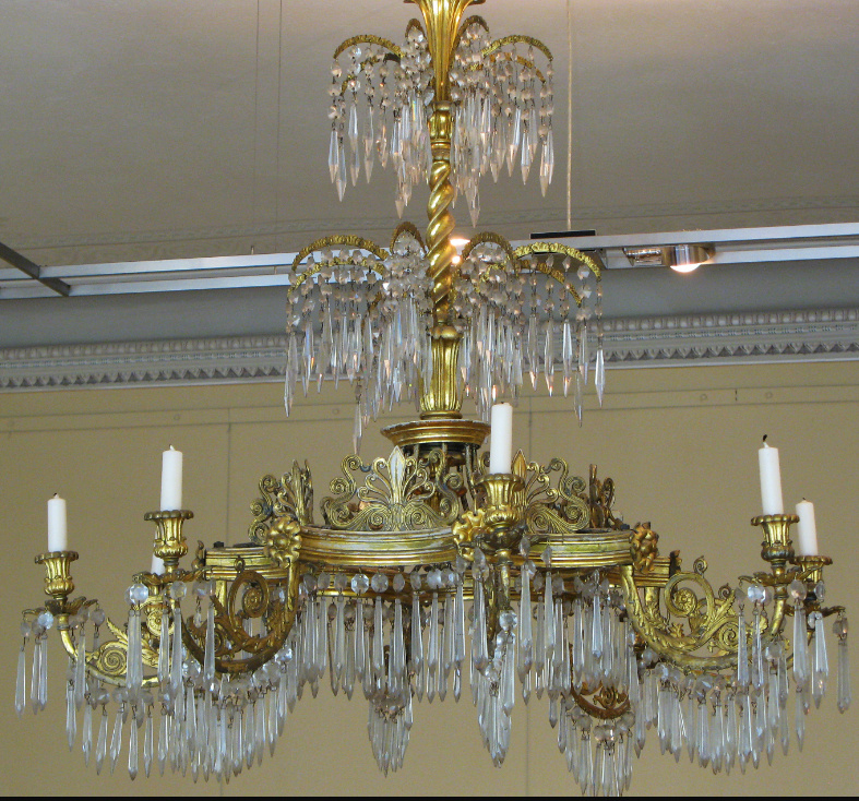 Kronleuchter im Wohnzimmer des Knoblauchhauses